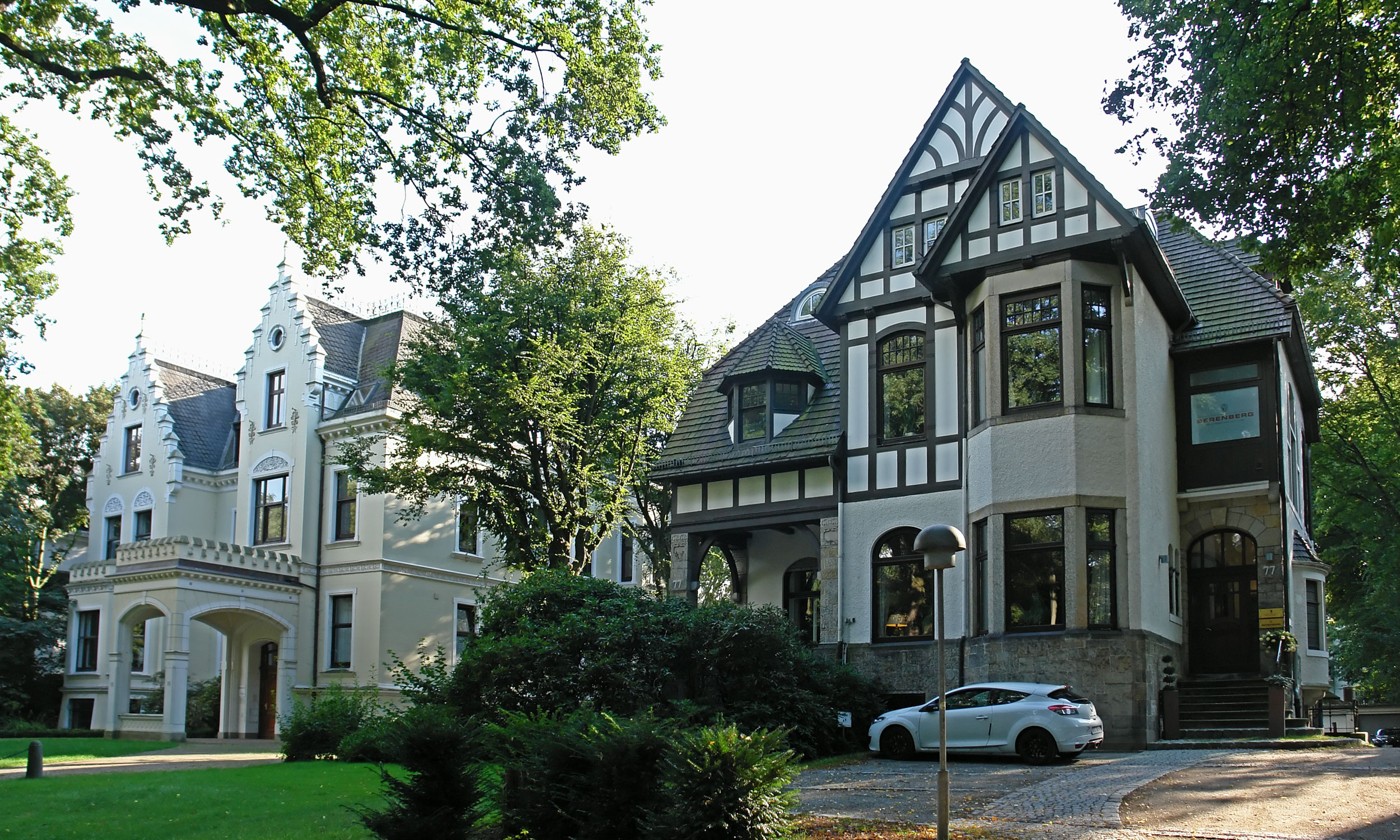 Wohnhausgruppe in Bremen, Hollerallee 75+77Die Denkmalgruppe ist ein geschütztes Kulturdenkmal in der Freien Hansestadt Bremen, mit der Nr. 0624 beim Landesamt für Denkmalpflege registriert.